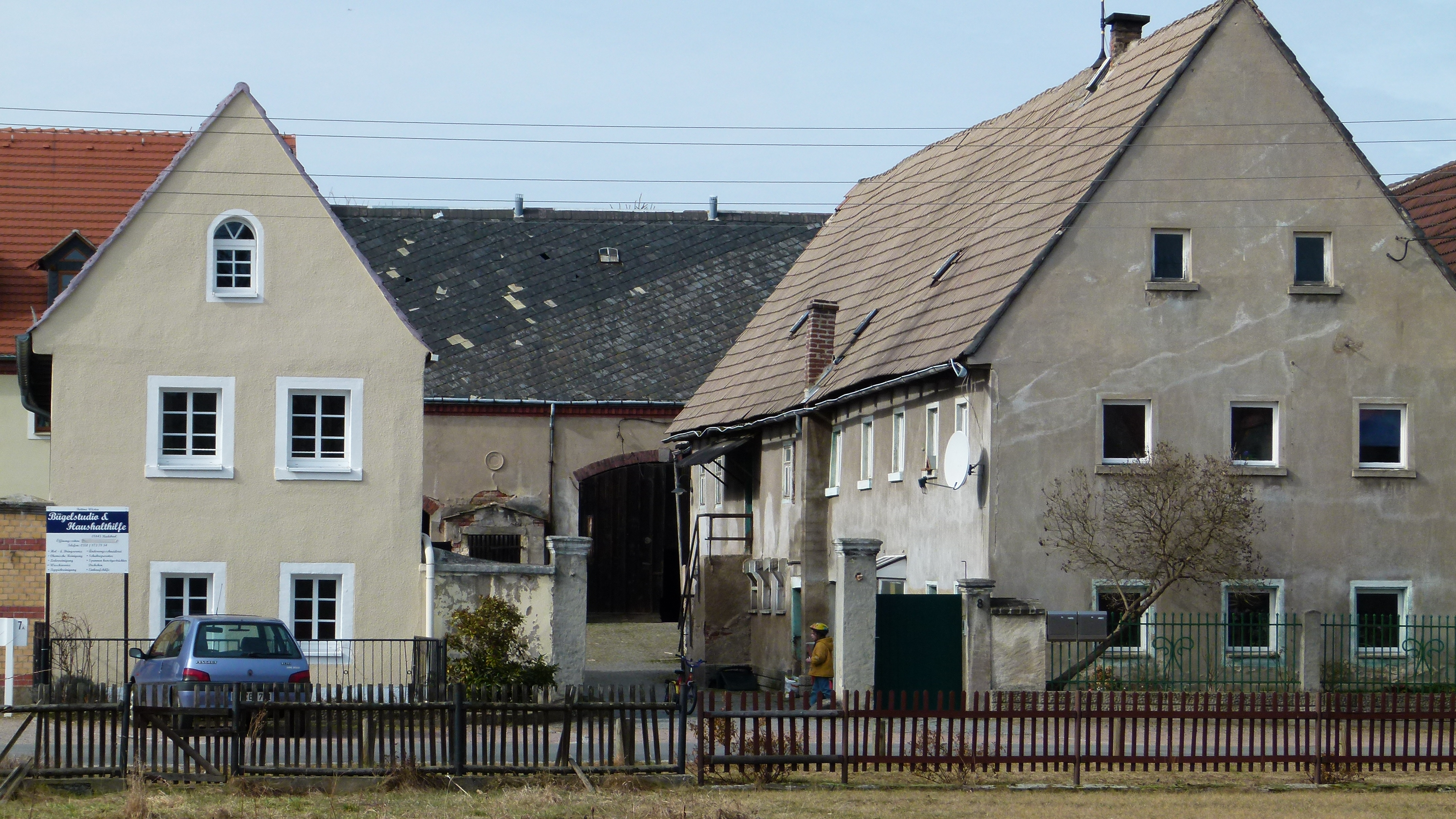 Denkmalgeschützte Gebäude, Altnaundorf 7-8, Radebeul